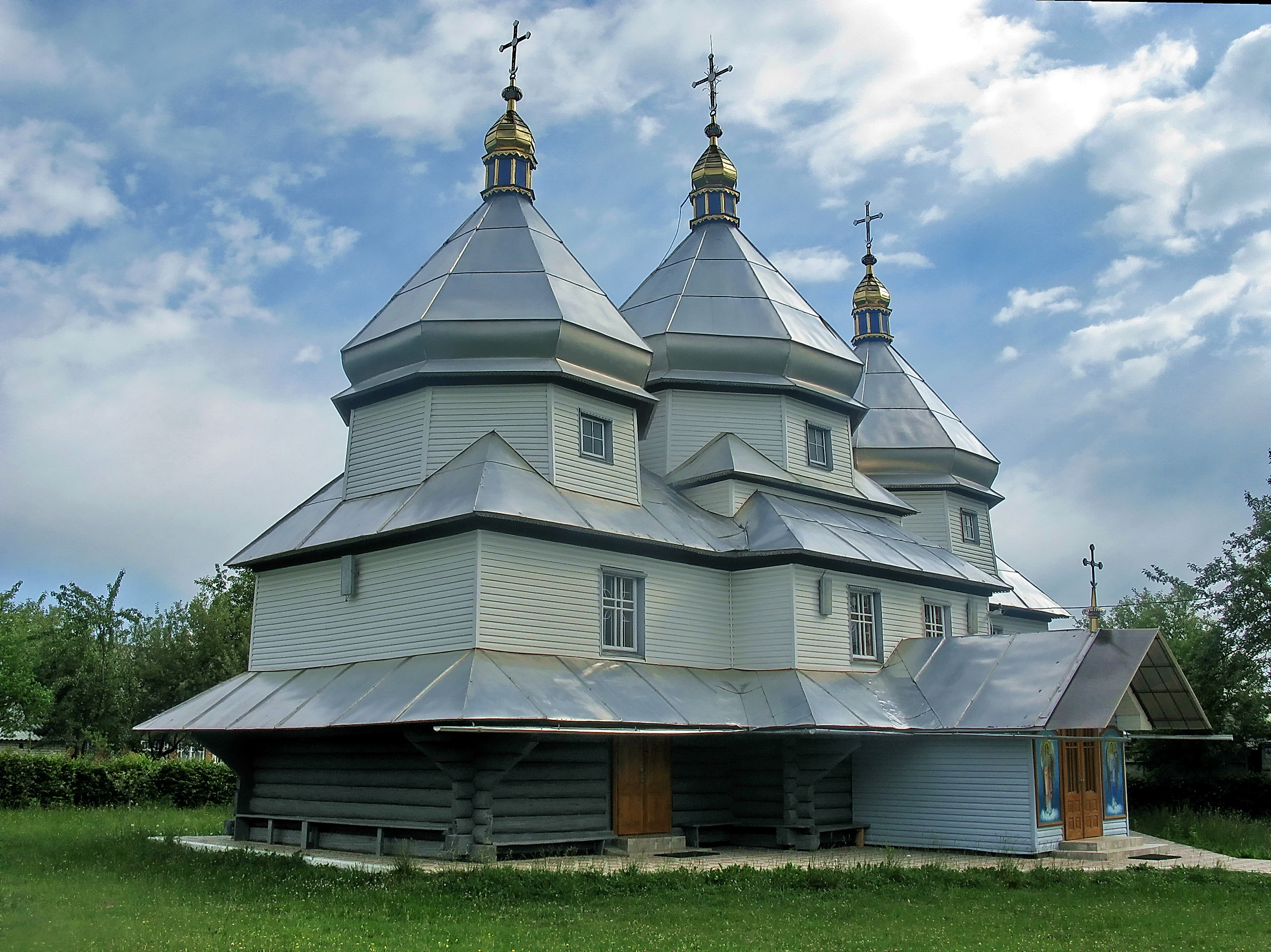 Юріївська церква та дзвіниця (дер.), смт. Берегомет